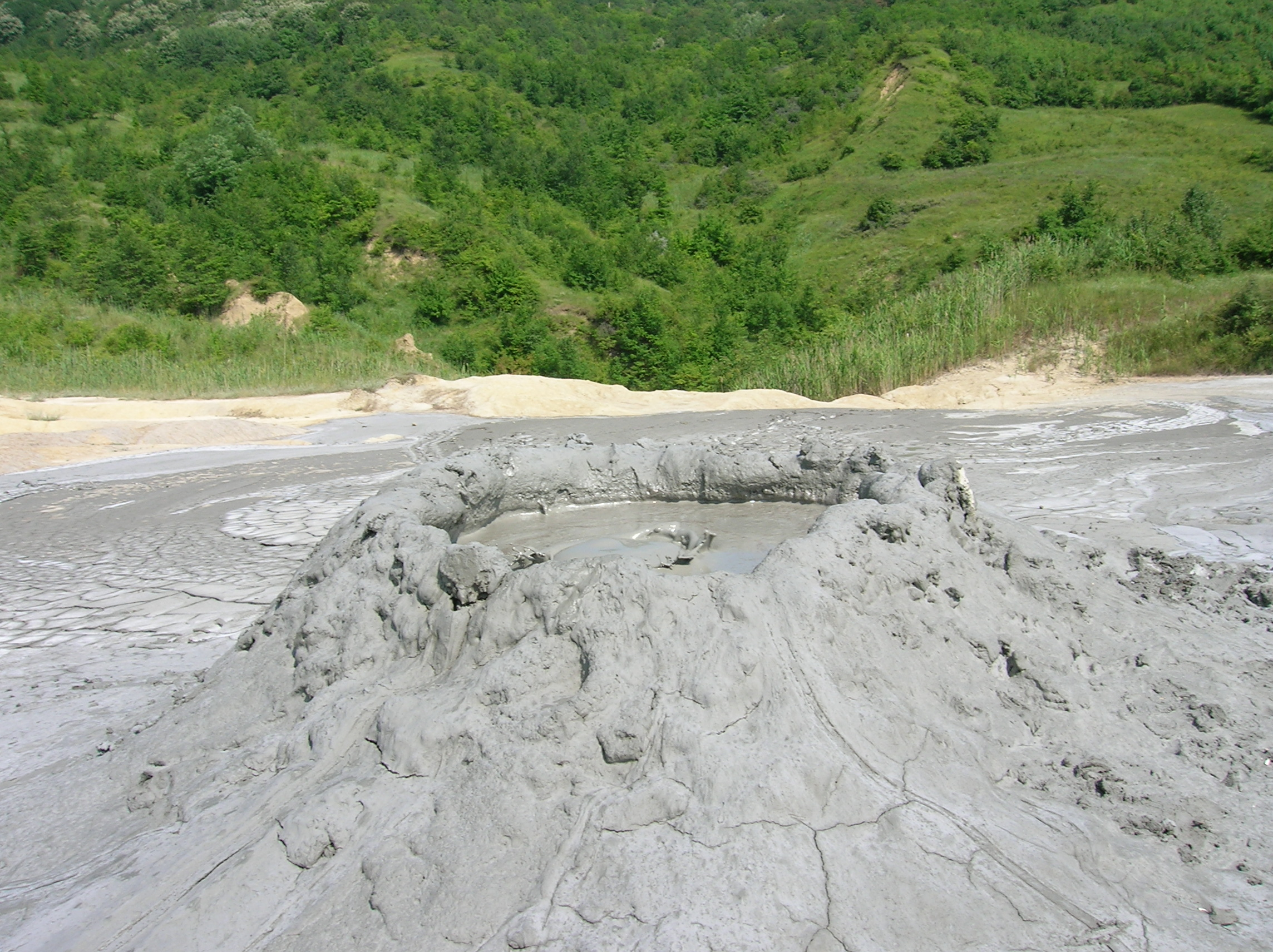 Near village Beciu (Scorţoasa commune)